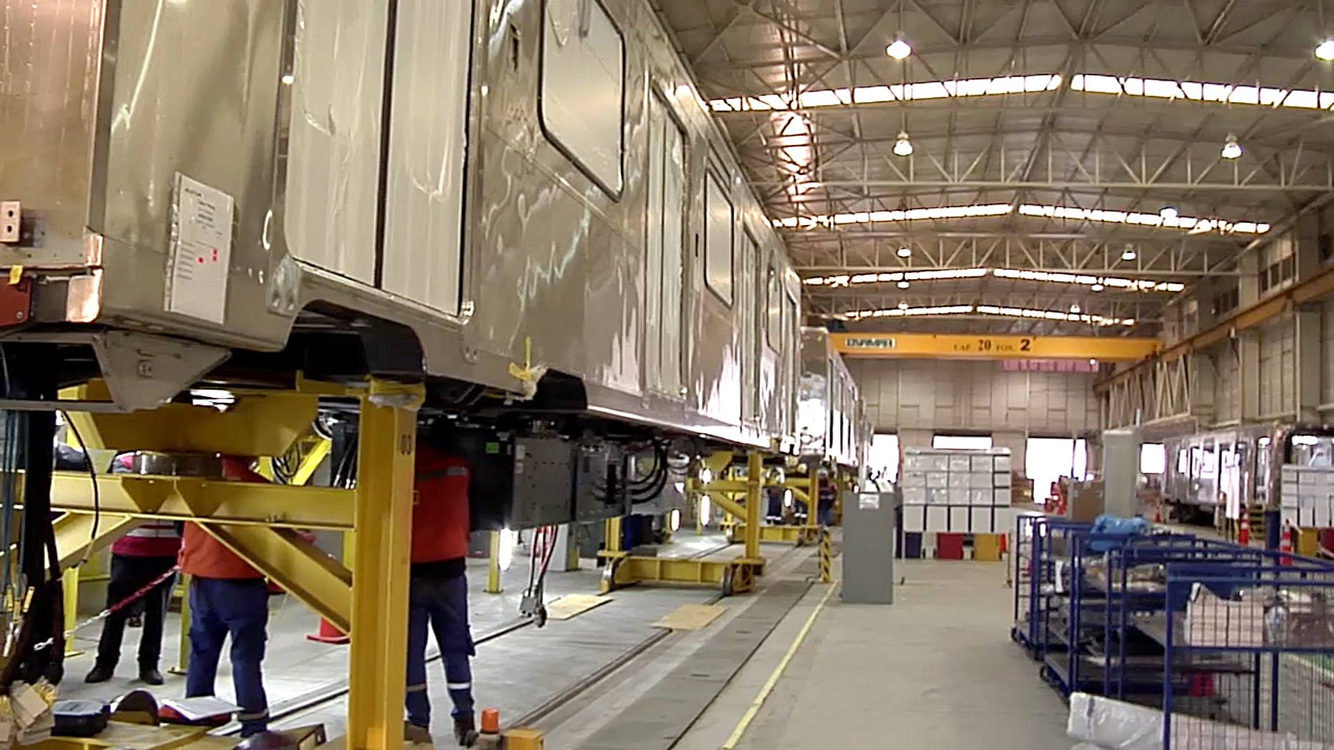 Vista de los talleres Neptuno de Metro de Santiago en donde se ensamblan los trenes NS16.